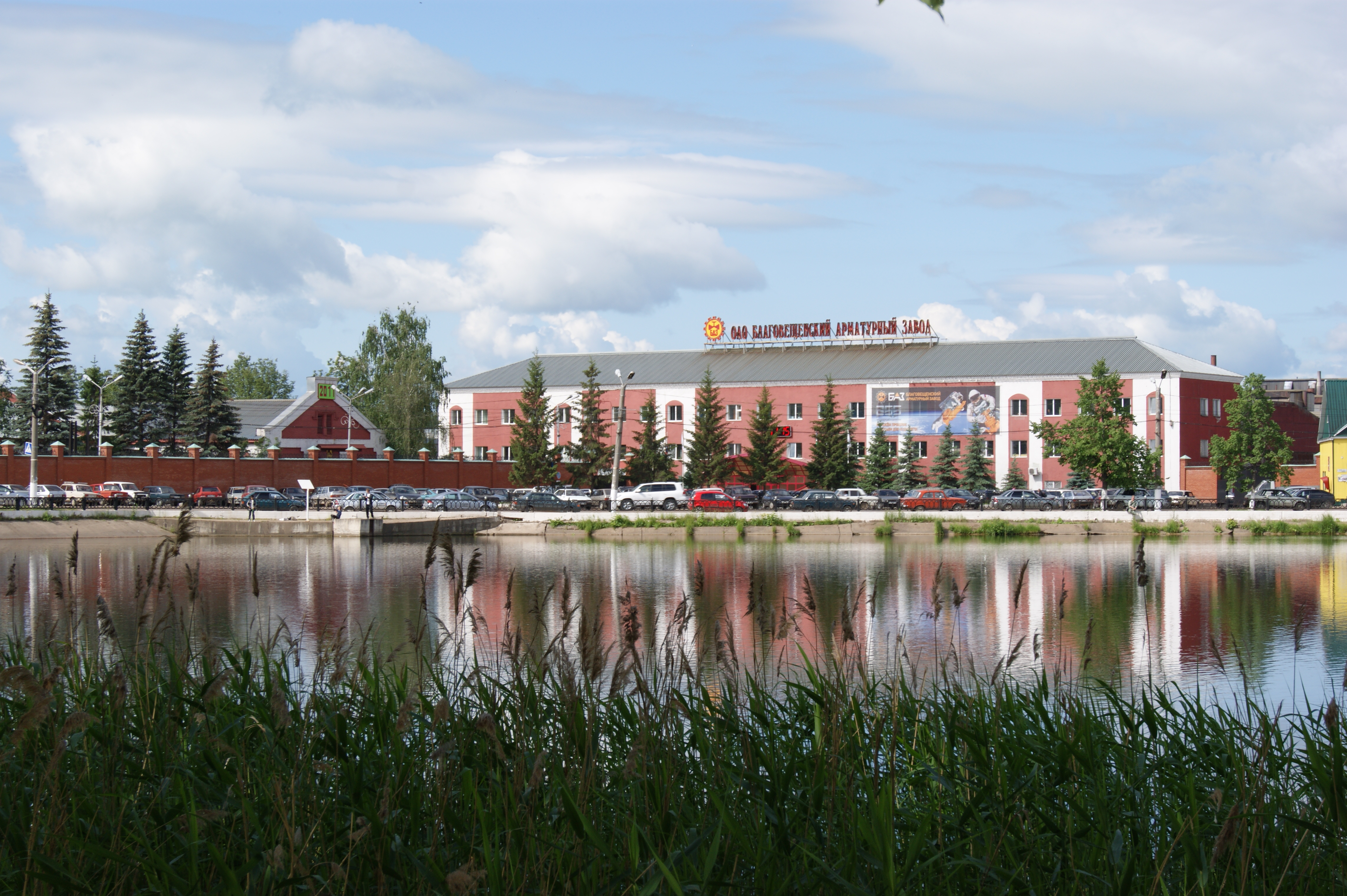 История города Благовещенска связана с основанием и строительством в 1756 году медеплавильной фабрики. В этом же году в день христианского праздника Благовещения была заложена одноимённая церковь, что и определило впоследствии название посёлка, позднее ставшего городом Благовещенском.